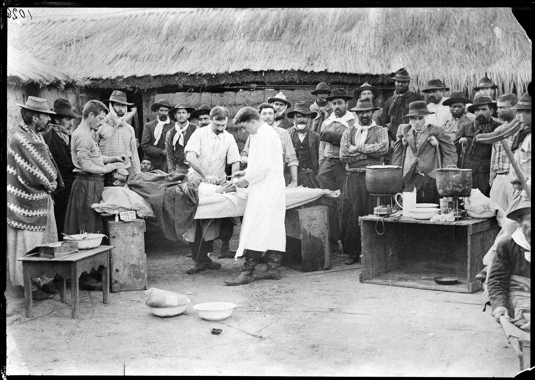 Intervencion quirurgica al aire libre llevada a cabo en en el Hospital Nacionalista por los cirujanos miembros de la guardia médica de Aparicio Saravia: Baldomero Cuencas y Lamas y Bernardino Fonticiolla, durante la revolucion de 1897.